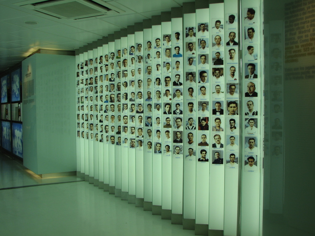 esta pared tiene las fotos de todos los jugadores que ha tenido el madrid...